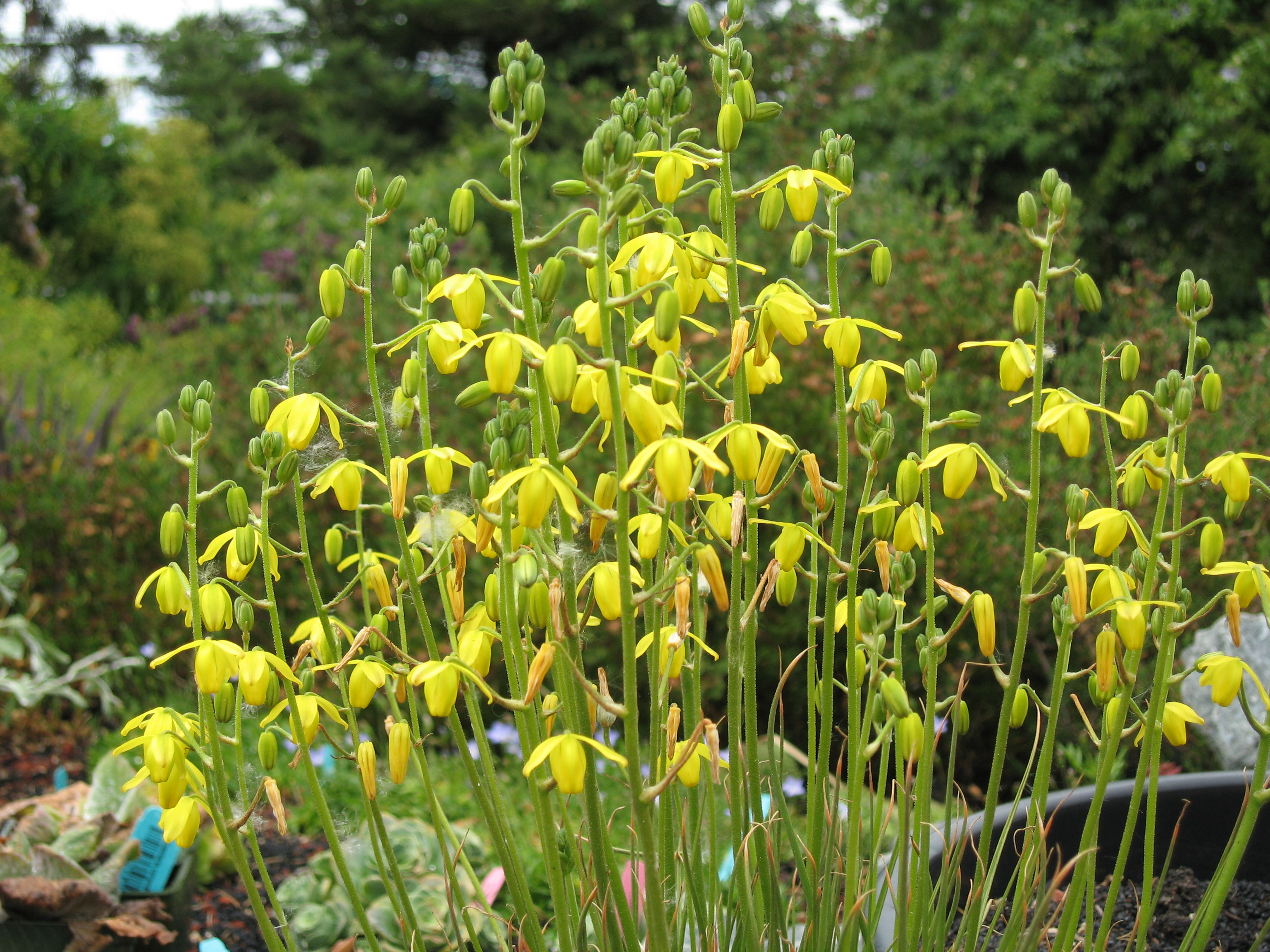 Albuca shawii, habit